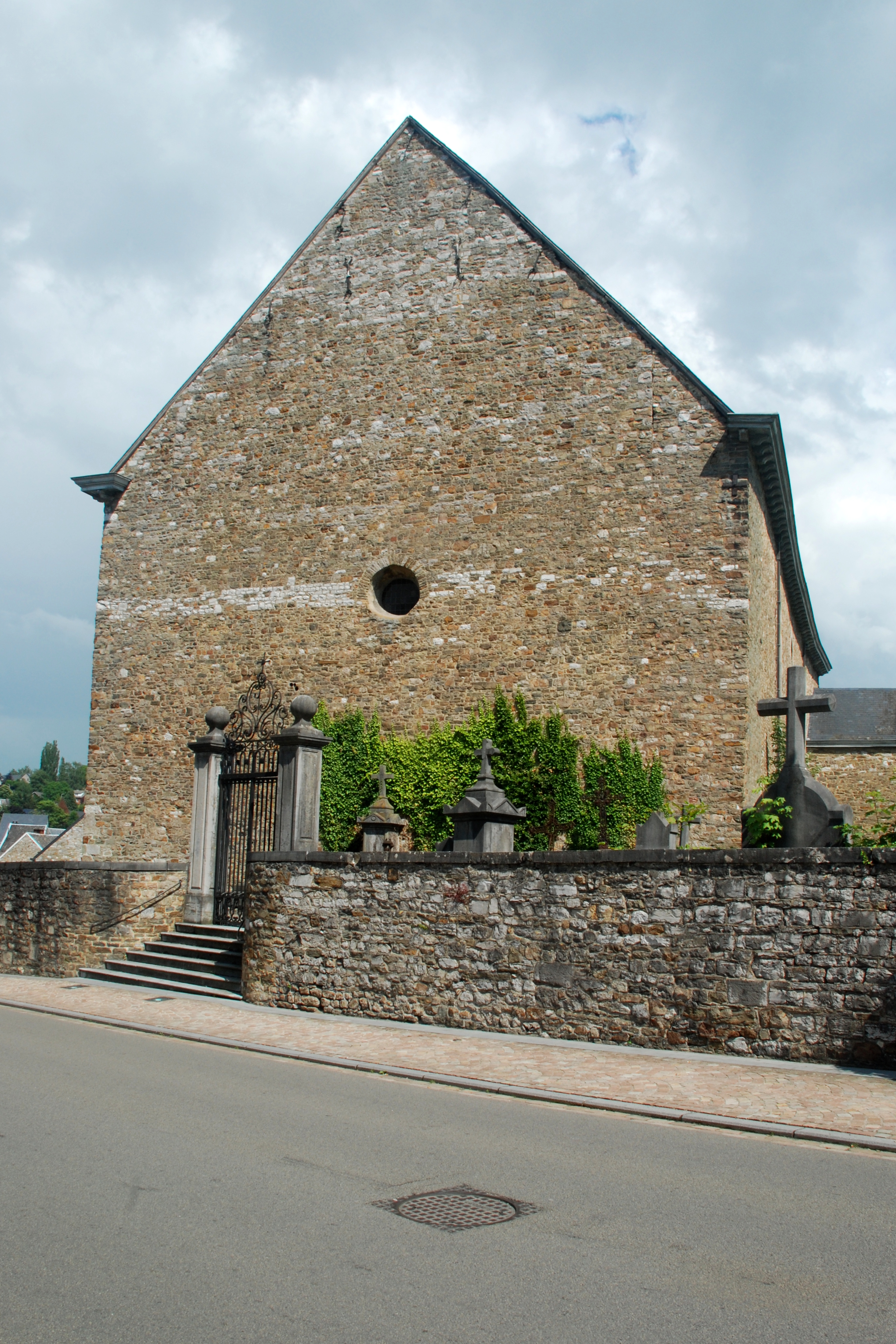 Belgique - Wallonie - Église Saints-Hermès-et-Alexandre de Theux